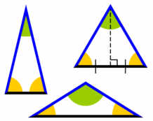 Tre eksempler på ligebenede trekanter, med farver og andet godt som man kan referere til i en artikeltekst. Måler 218 pixels i bredden, og 173 i højden.